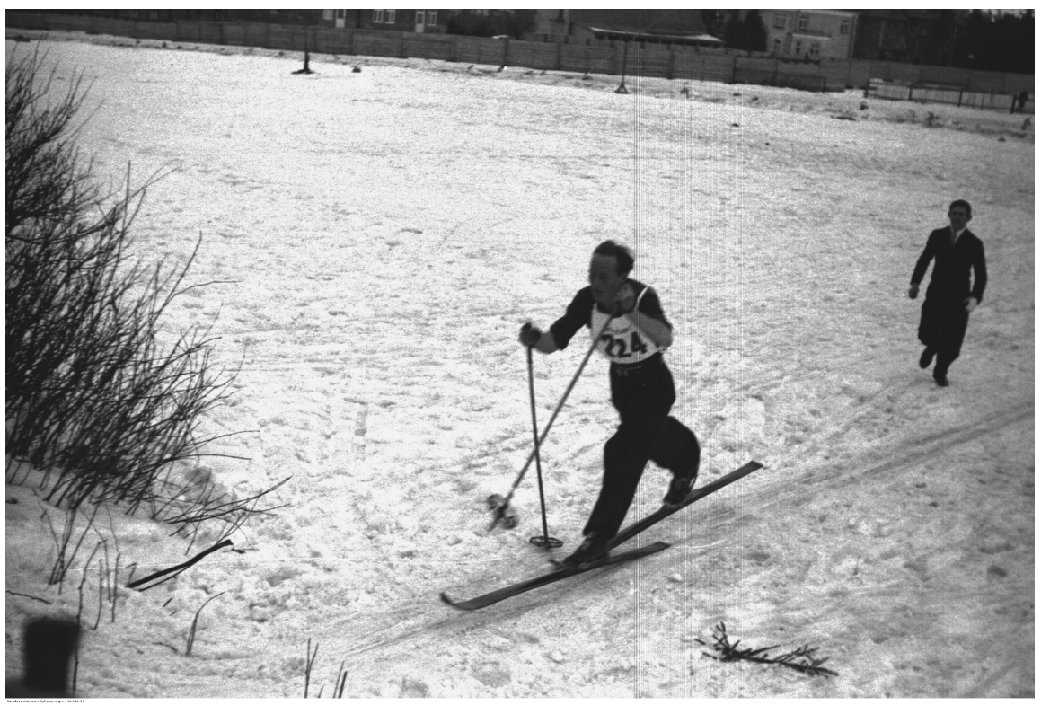 Henryk Mückenbrunn lors d'une course à Zakopane en 1932